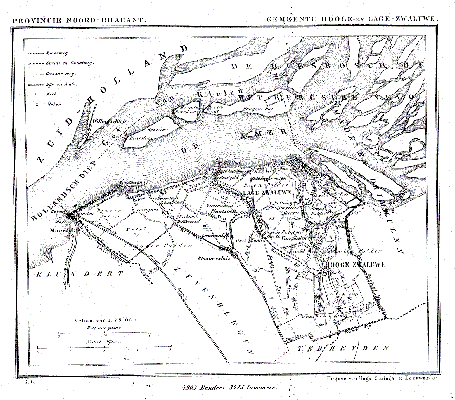 Nederland, Noord-Brabant, Gemeente Hooge en Lage Zwaluwe